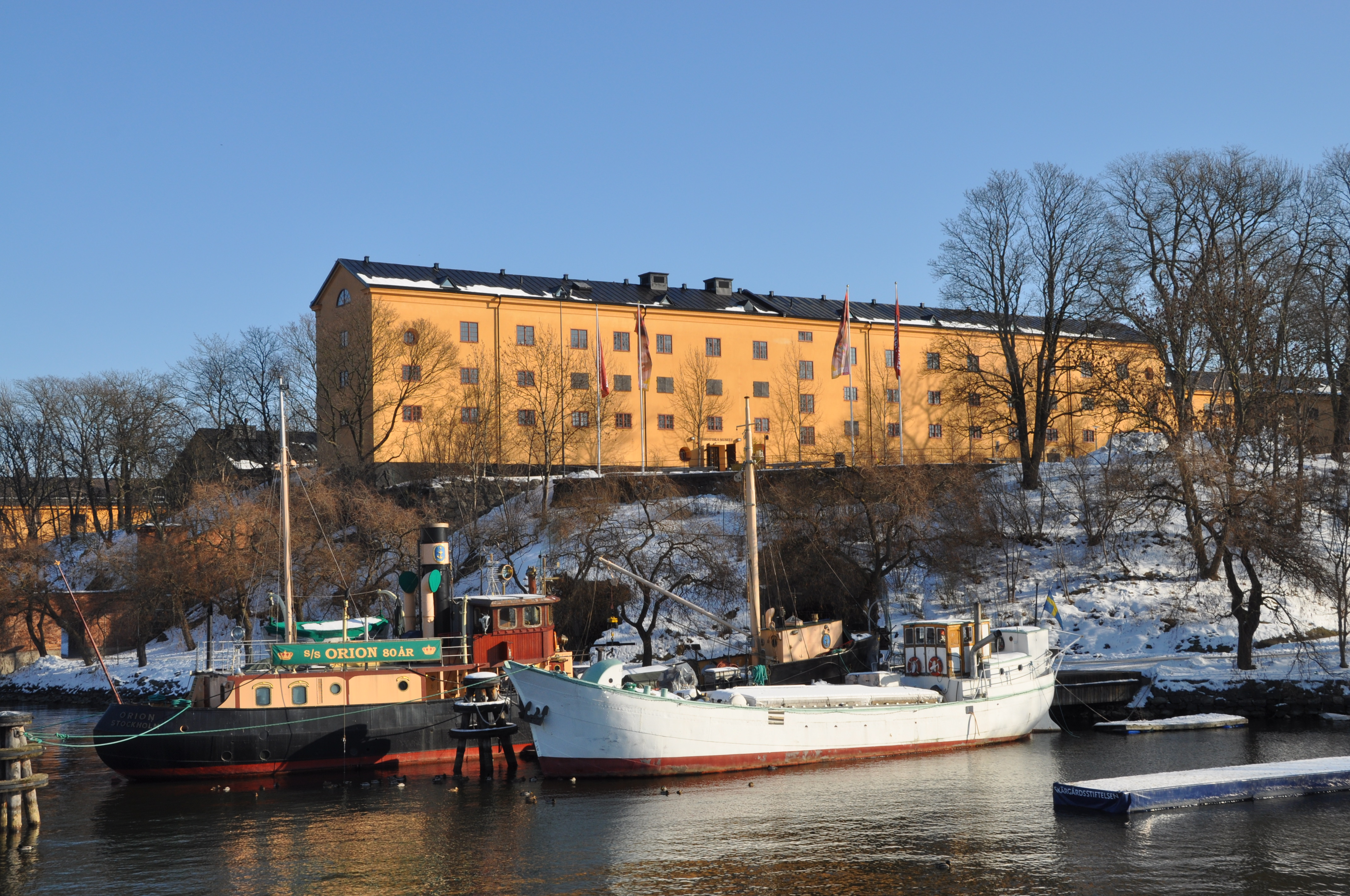 Tyghuset, Skeppsholmen